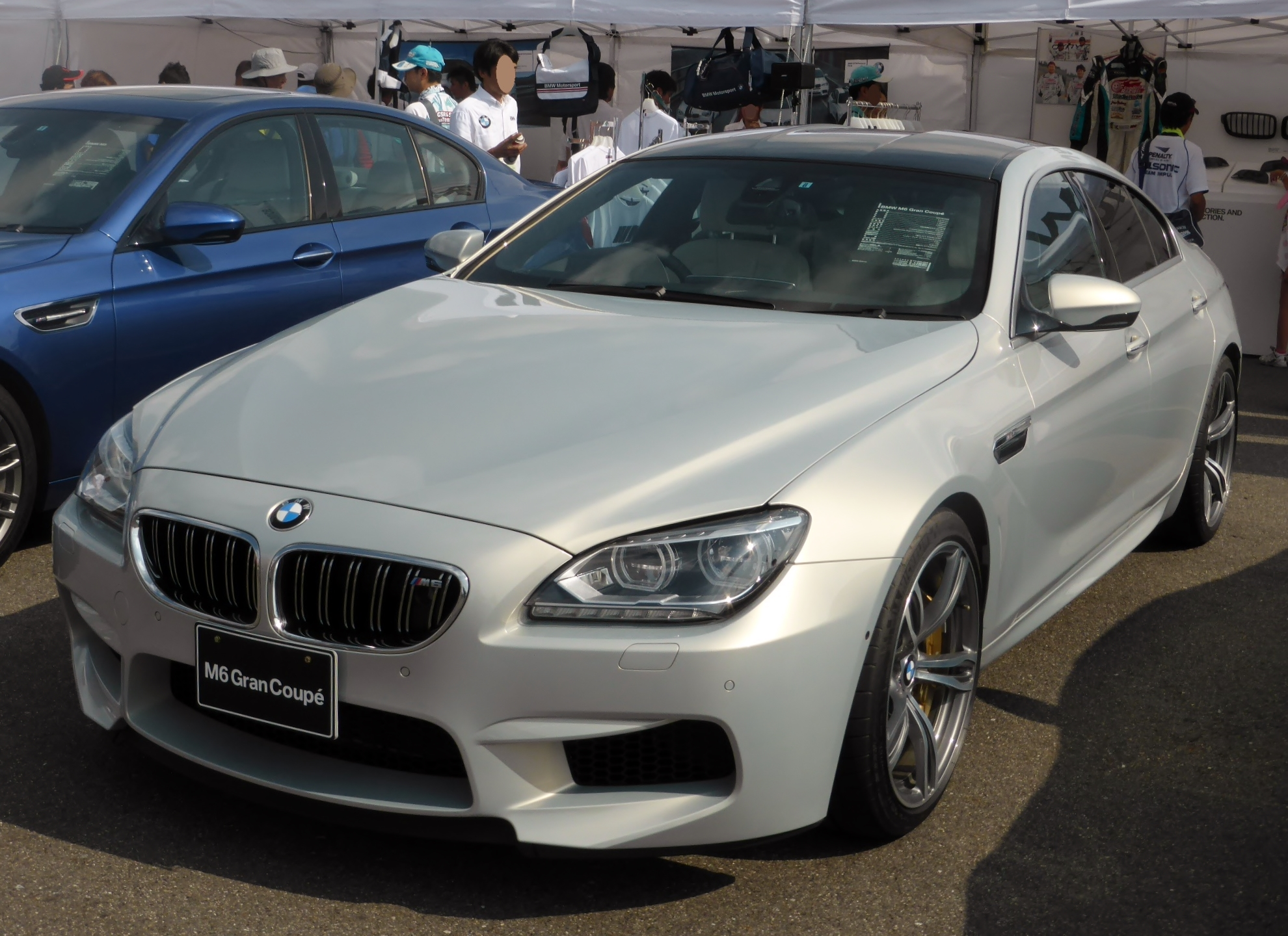 F06型BMW・M6グランクーペをフロントから撮影。後日みんカラにもアップロード予定。